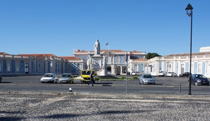 Queluz Corp de loggis